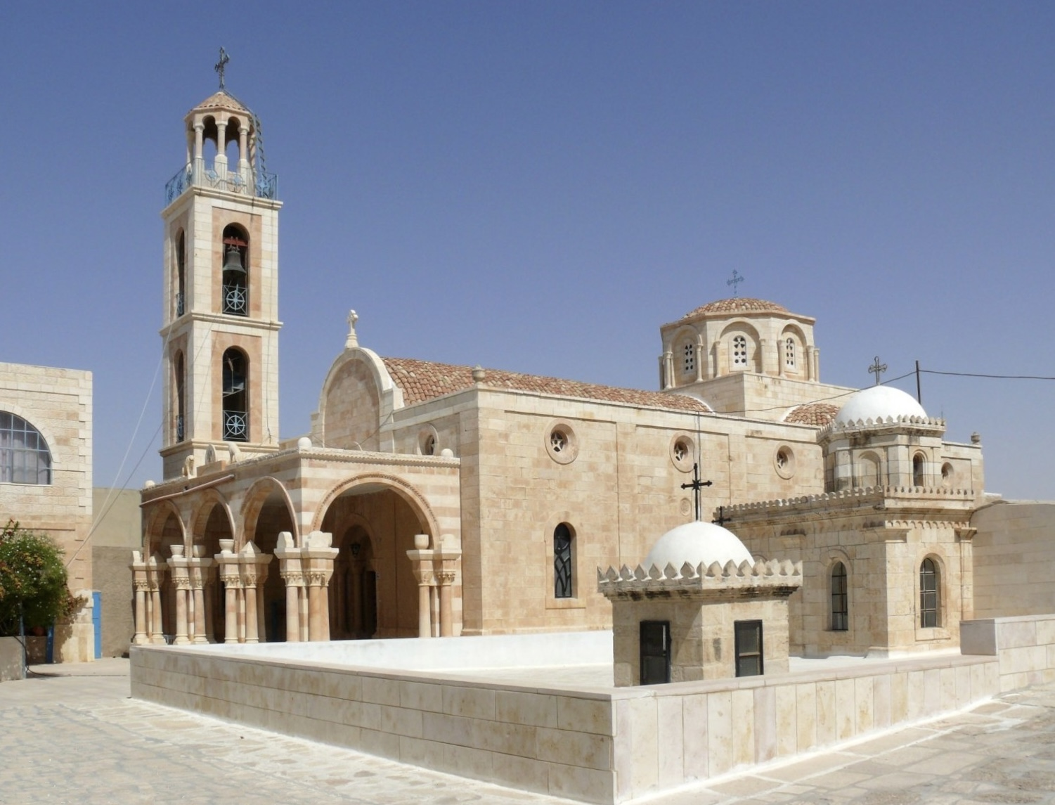 Al-Ubeidiya